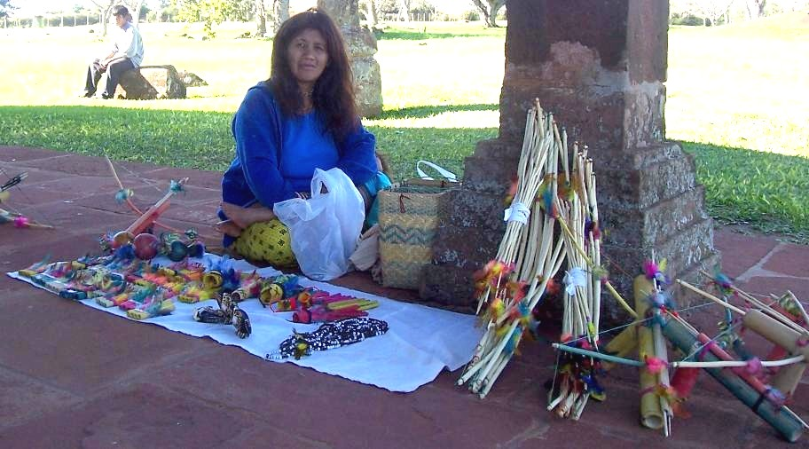 Guaraníes vendiendo sus artesanías en la misión jesuítica de Sao Miguel das Missoes, Brasil